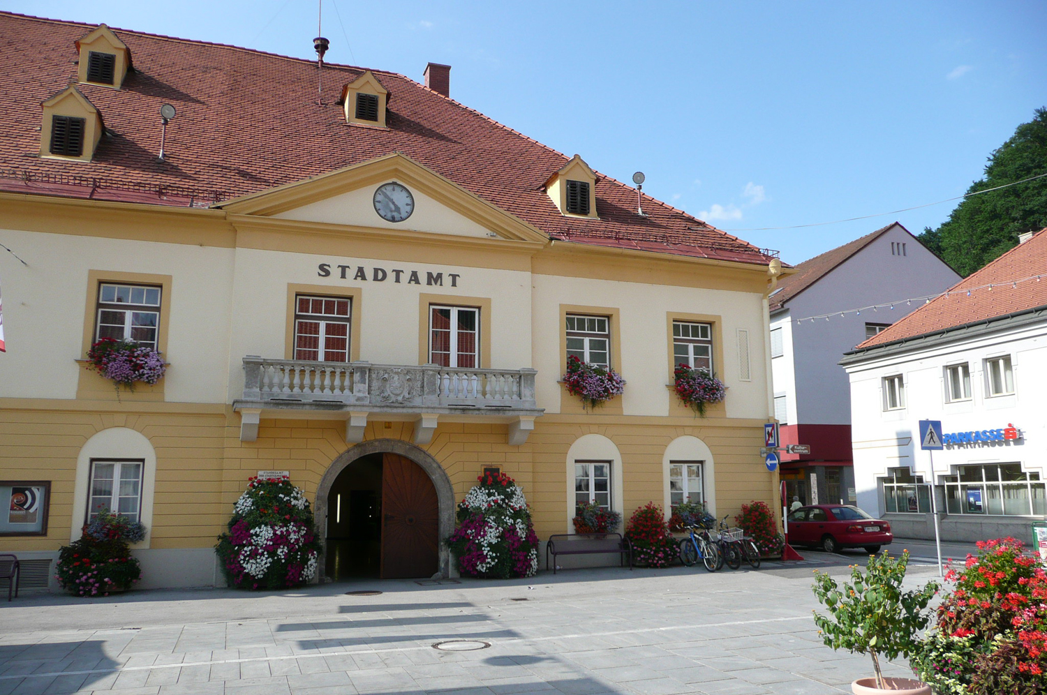 Rathaus am Hauptplatz von Kapfenberg